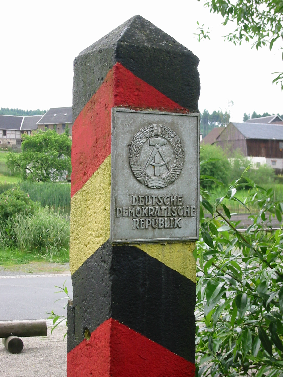 Grenzpfosten der DDR in Mödlareuth